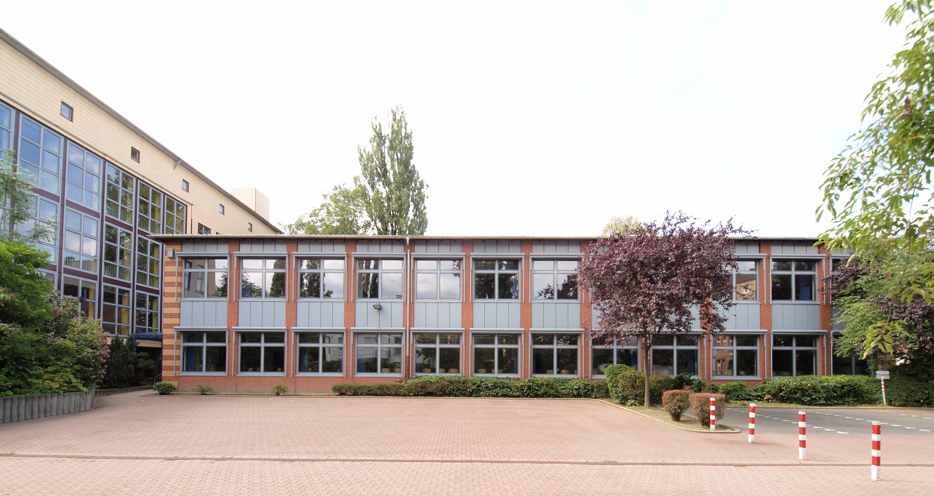 Gebäude das Haranni-Gymnasiums in Herne-Mitte, Ansicht des Neubaus, links der Erweiterungsbau von 1955 mit erneuerter Fassade.